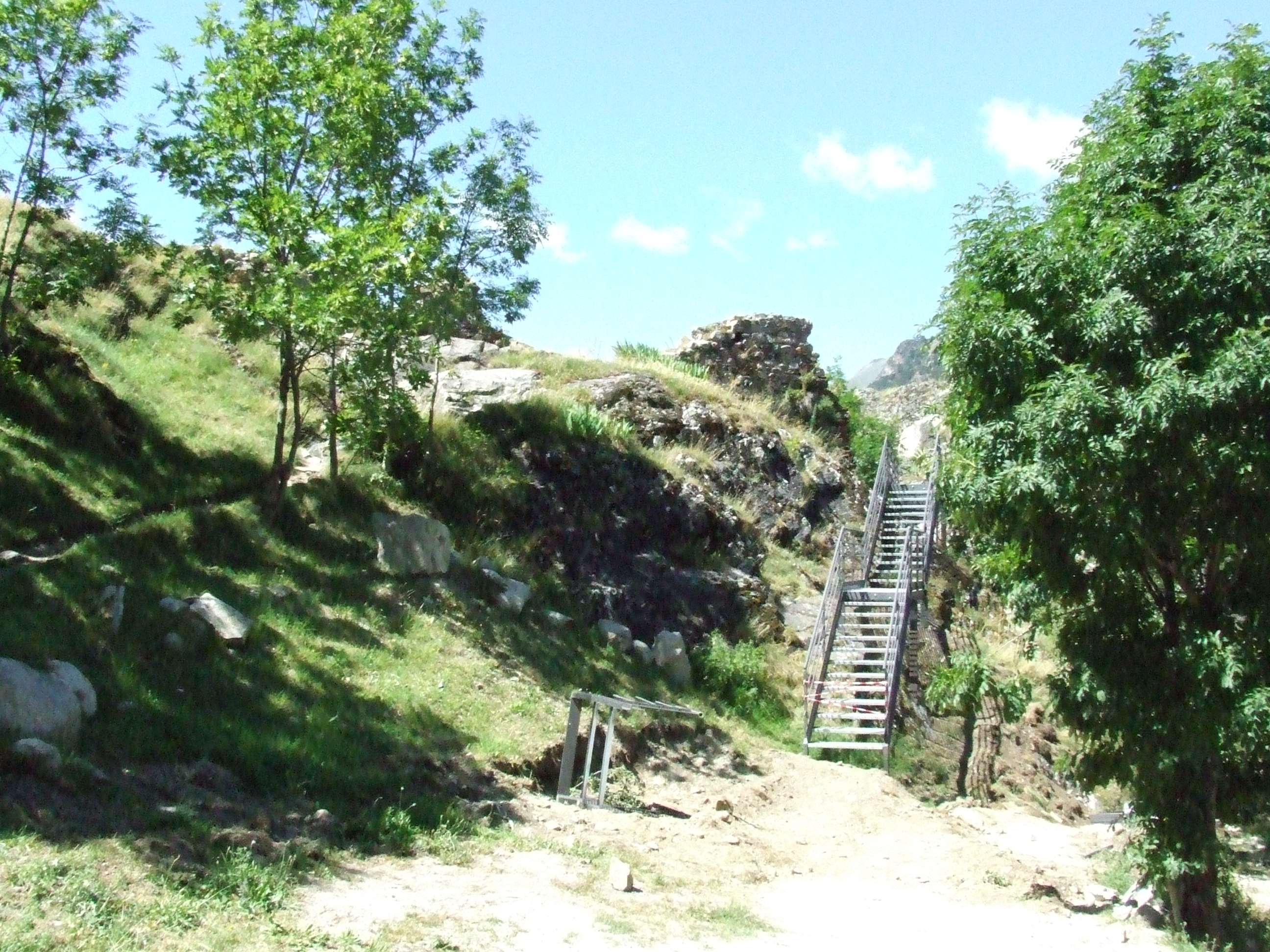 Restes del Castell de Boí (Vall de Boí, Alta Ribagorça)